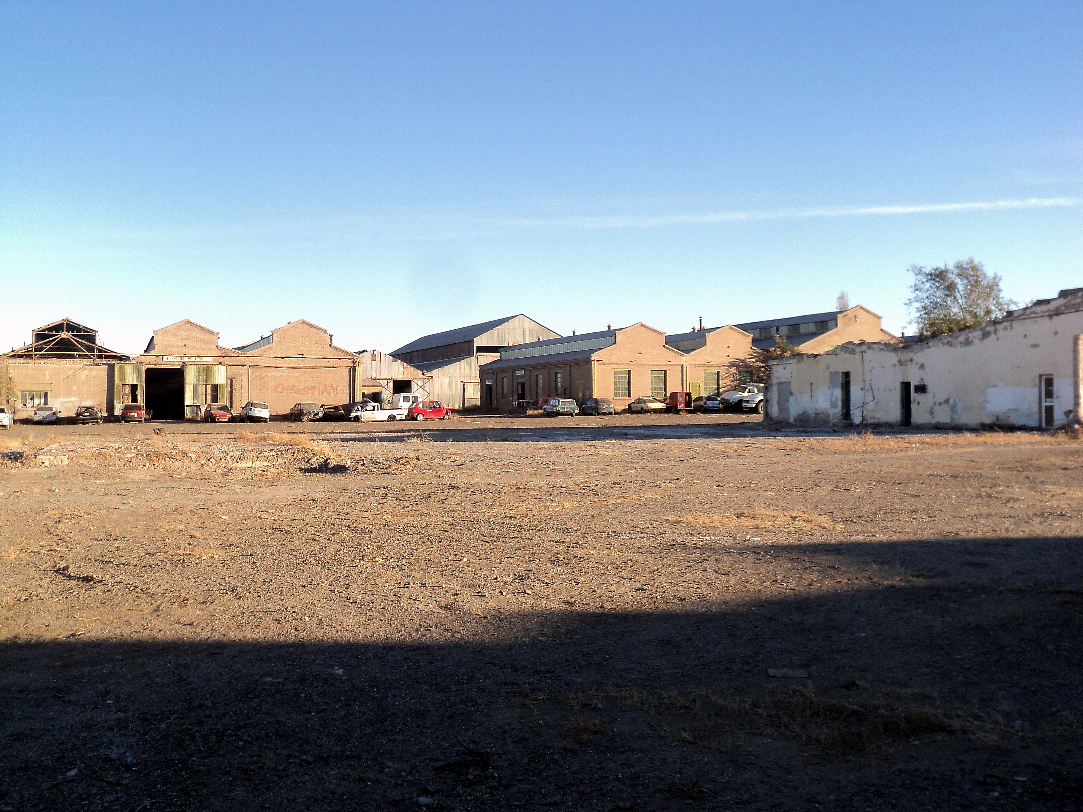 Los galpones de la Conferpet hoy como simples depositos de Petroquímica